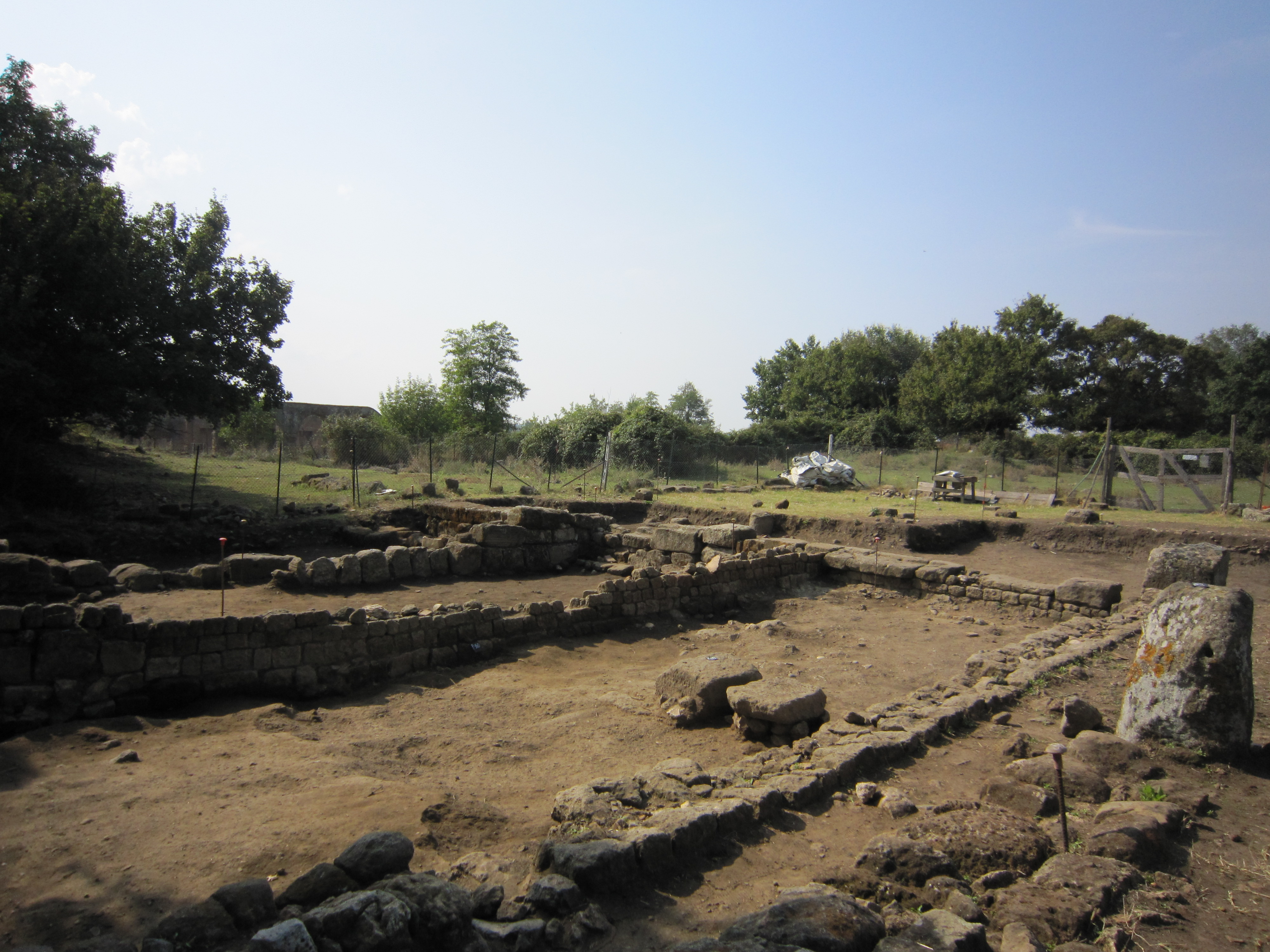 Ferento: resti di edificio medievale